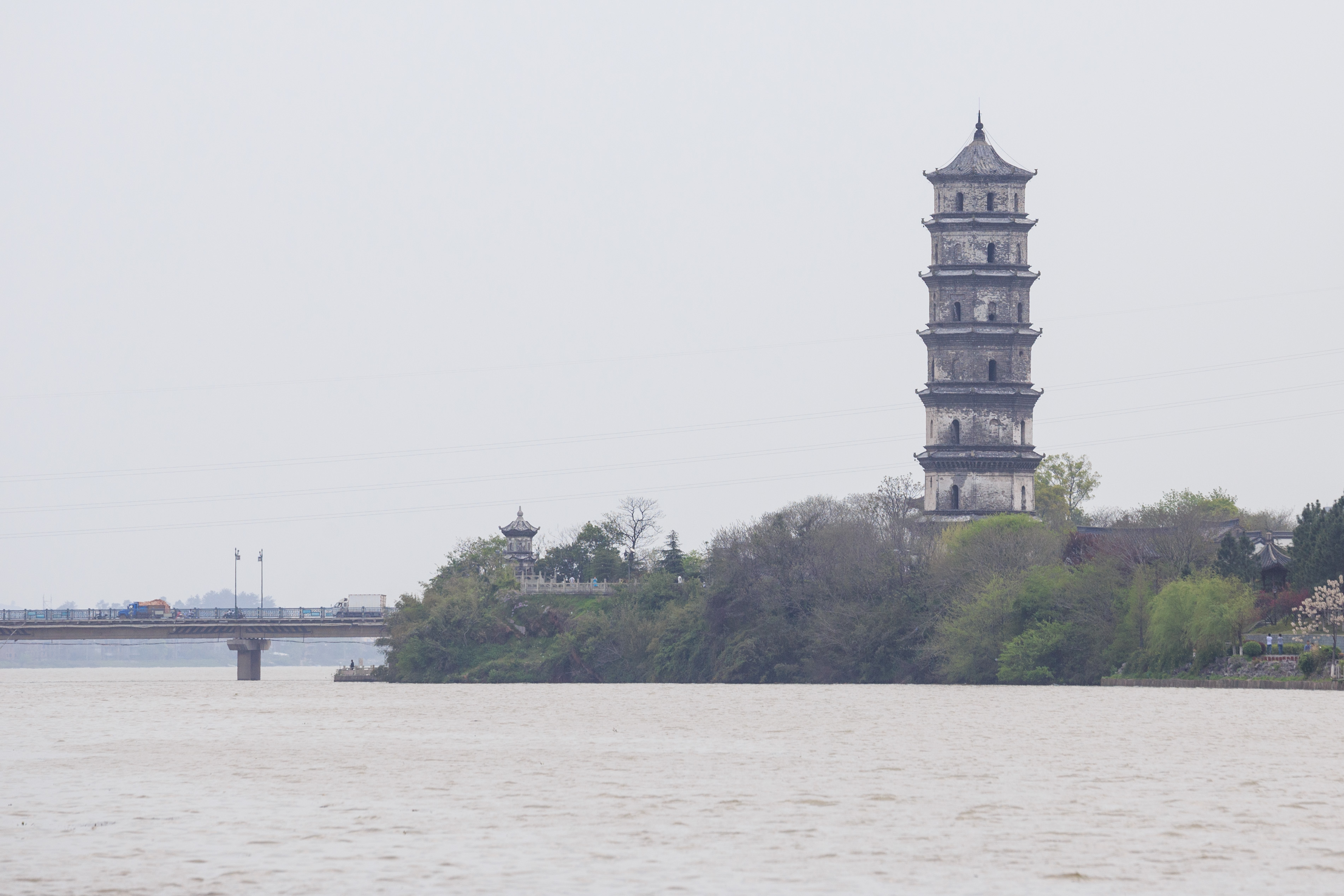 上饶奎文塔